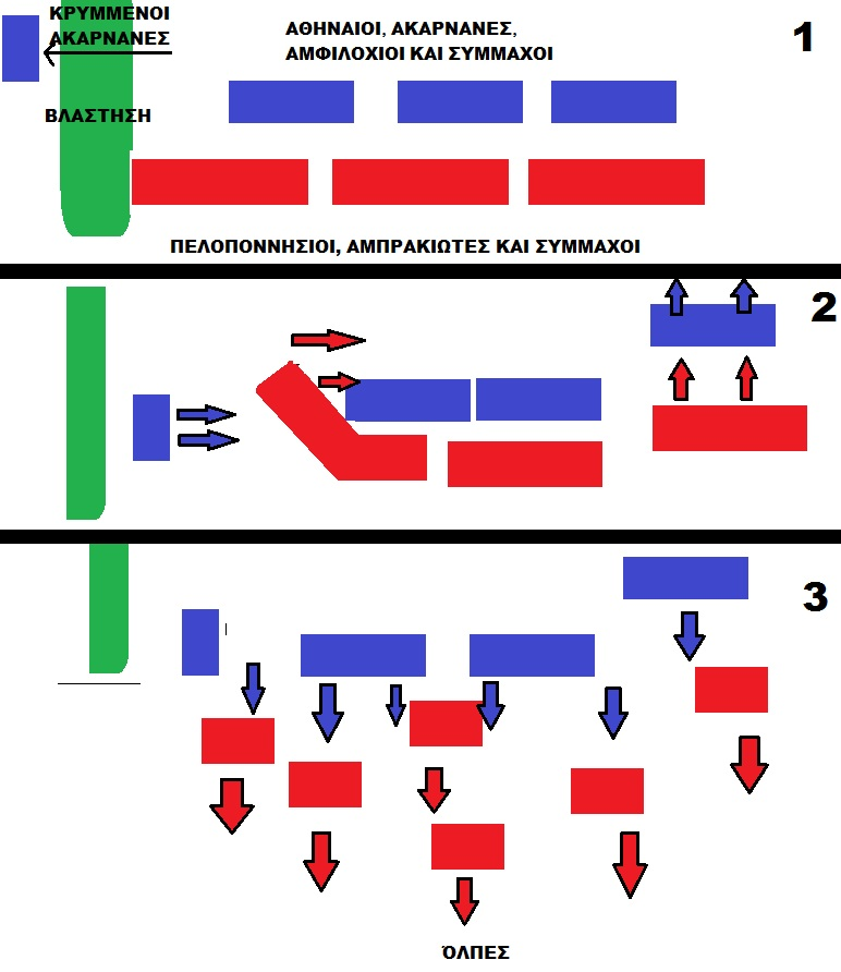 Εξέλιξη μάχης στις Όλπες